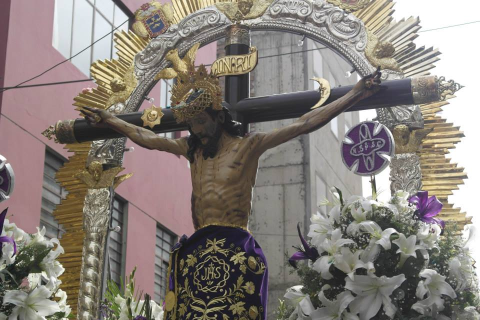 gran procesion del señor del santuario